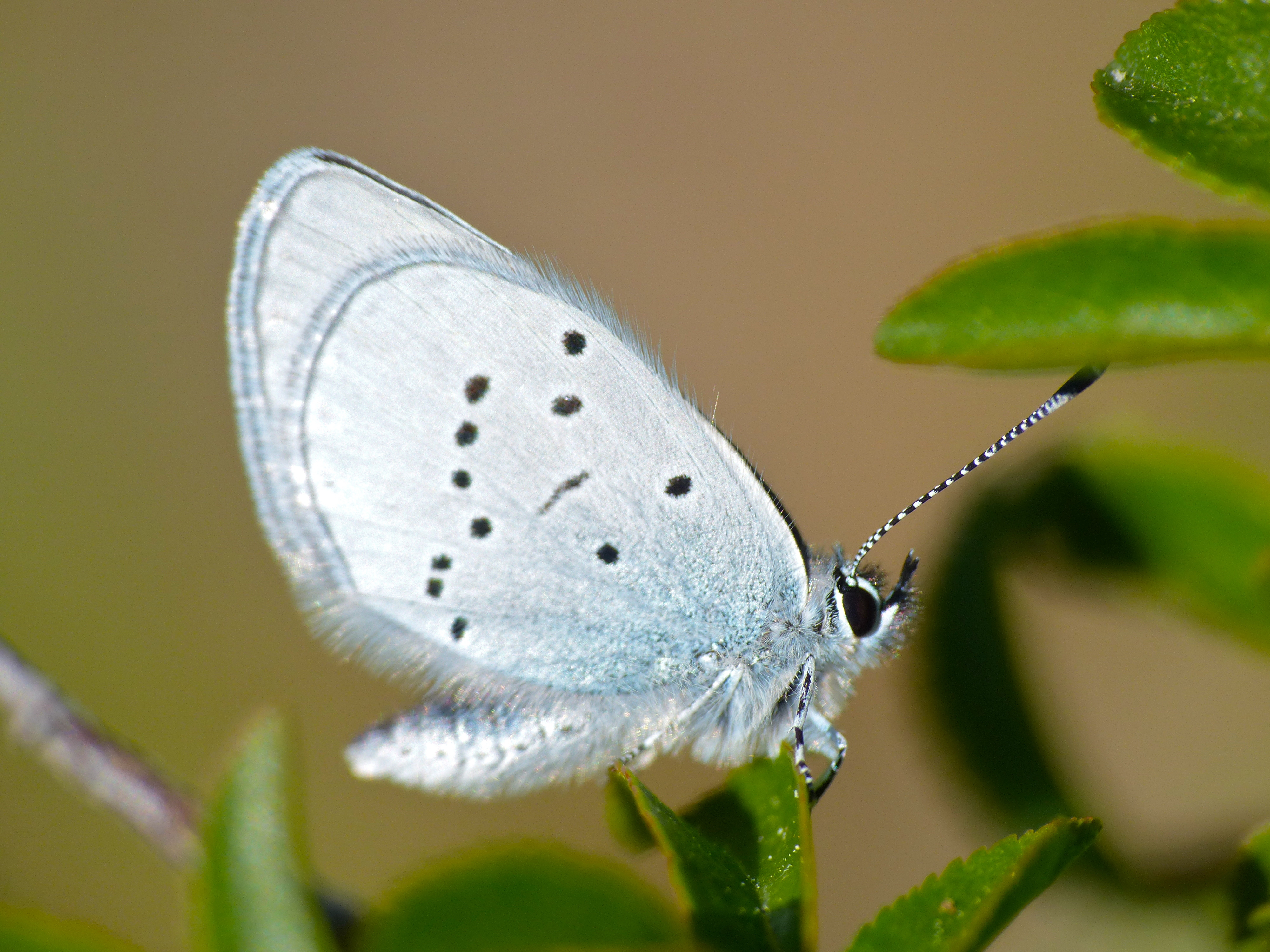 Les Rives, Hérault, FRANCE